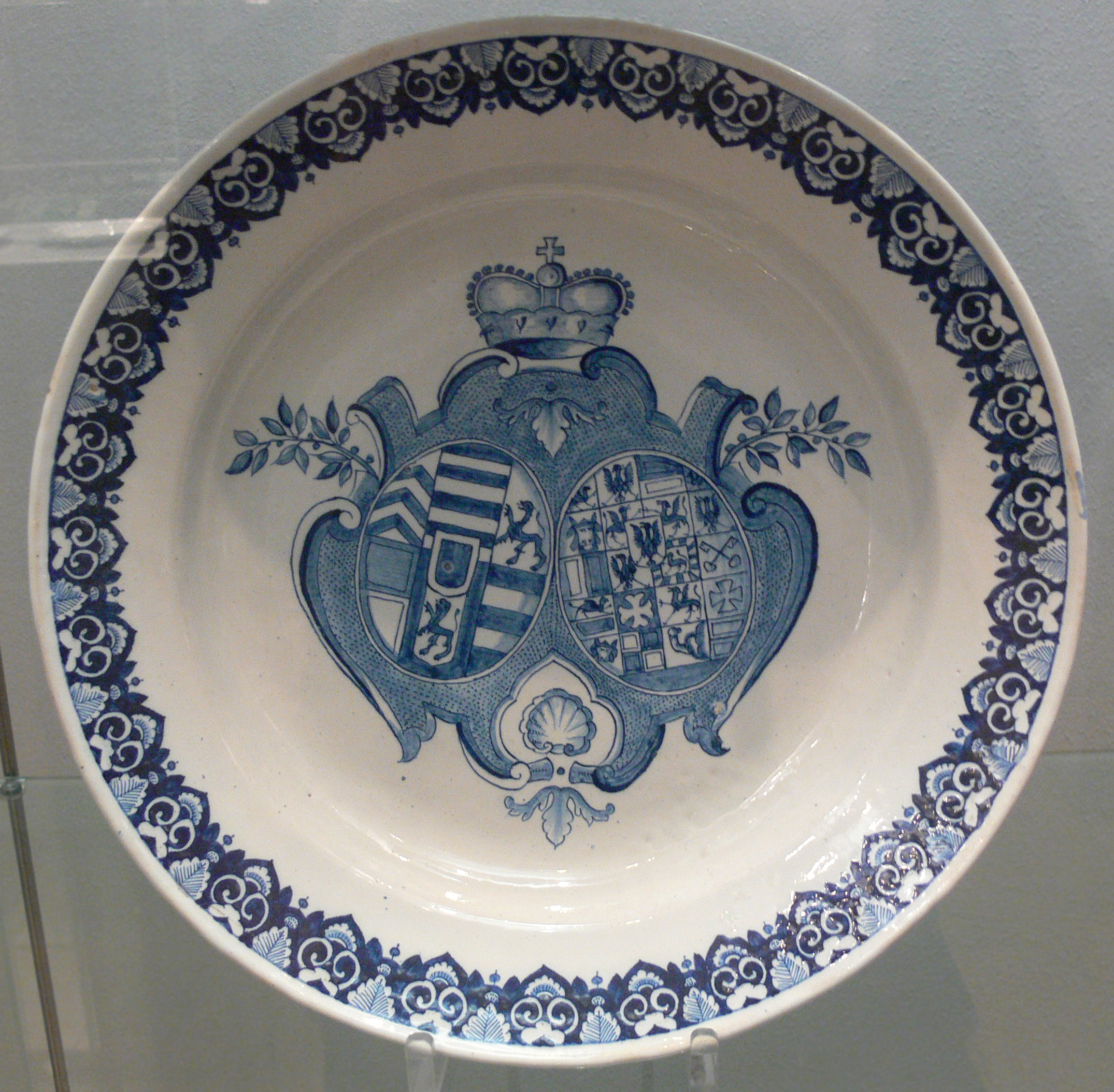 Schüssel mit Allianzwappen Johann Reinhard III. Graf zu Hanau und Dorothea Friderika zu Brandenburg-Ansbach, Ansbacher Fayence mit Blaudekor, wohl 1724 Bayerisches Nationalmuseum München